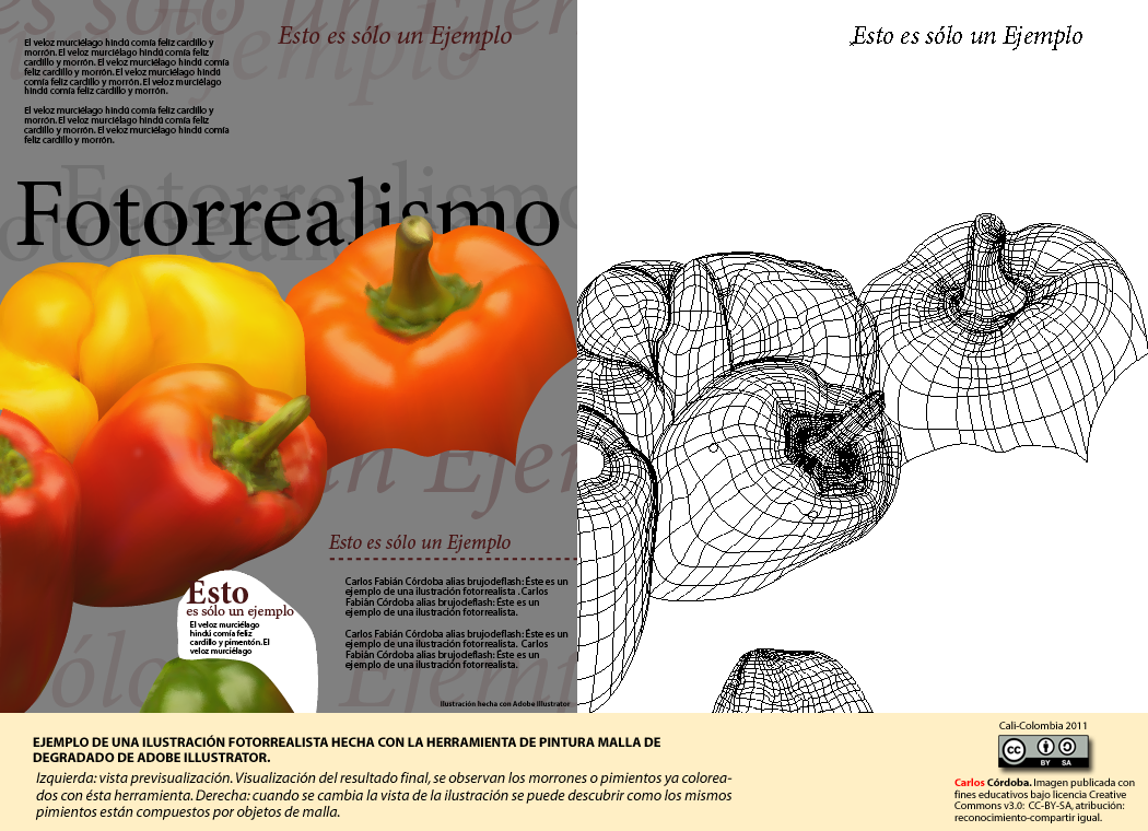 Ejemplo de ilustración creada con Adobe Illustrator.Formato PNG